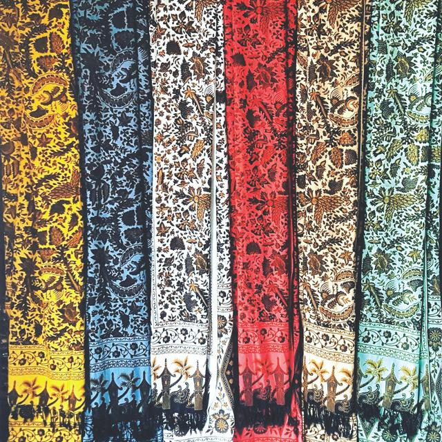 Batik Tanah Liek